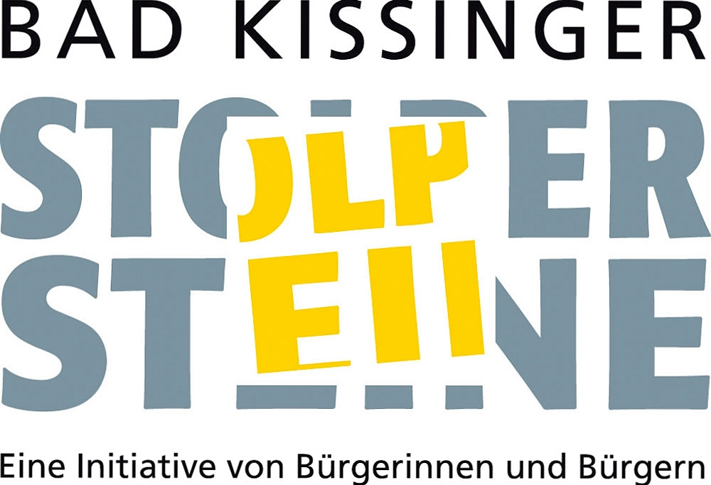 Offizielles Logo der Bürger-Initiative "Bad Kissinger Stolpersteine"